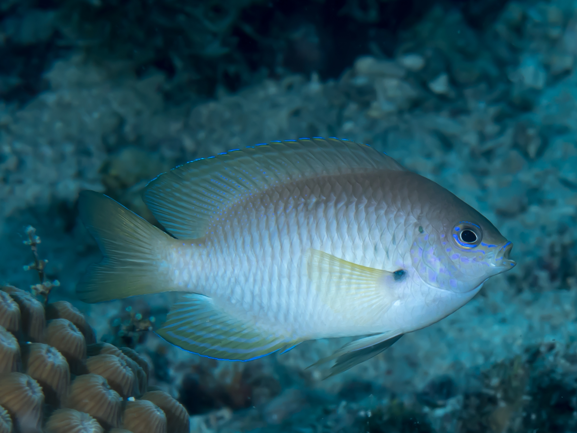 Romblon, Philippines - Ambon damsel juvenile (Pomacentrus amboinensis)